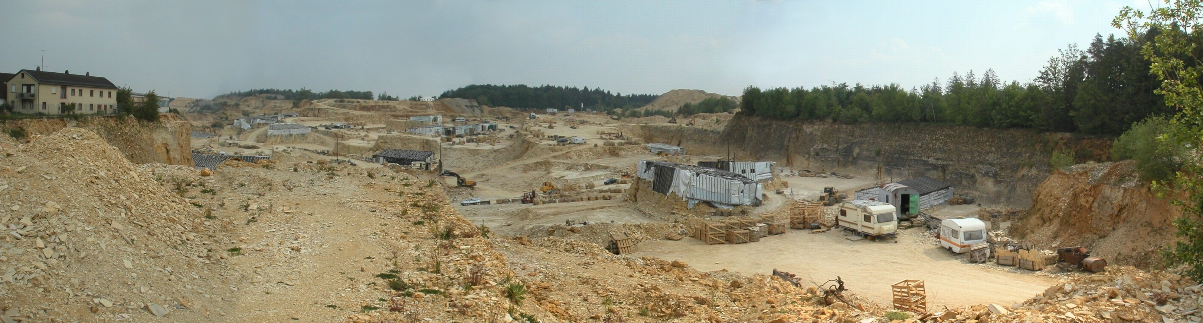 Steinbruch in Solnhofen, Bayern. Solnhofener Plattenkalk